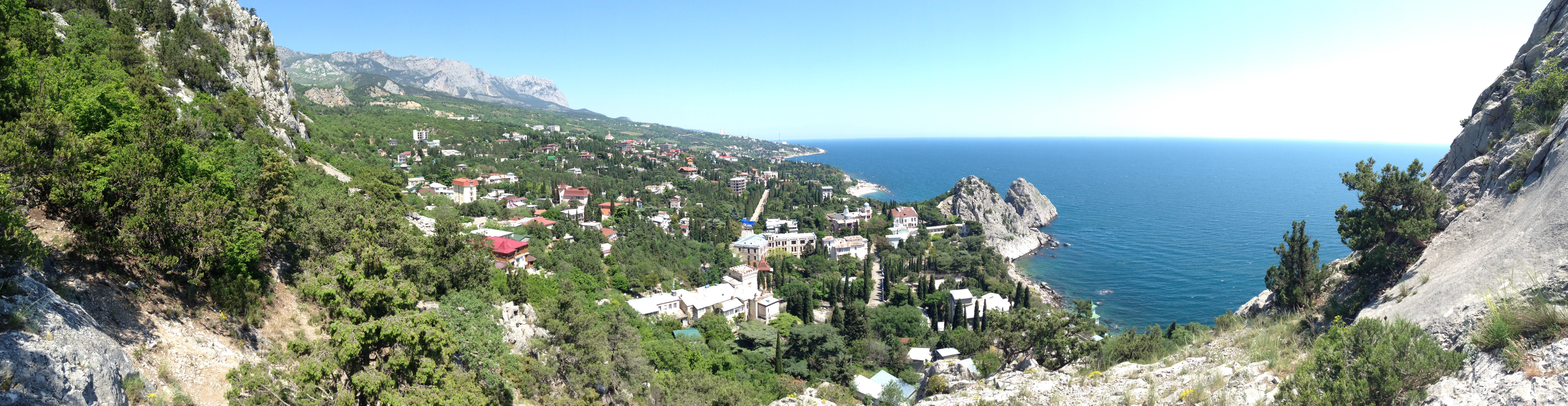 Симеиз, вид с горы Кошка